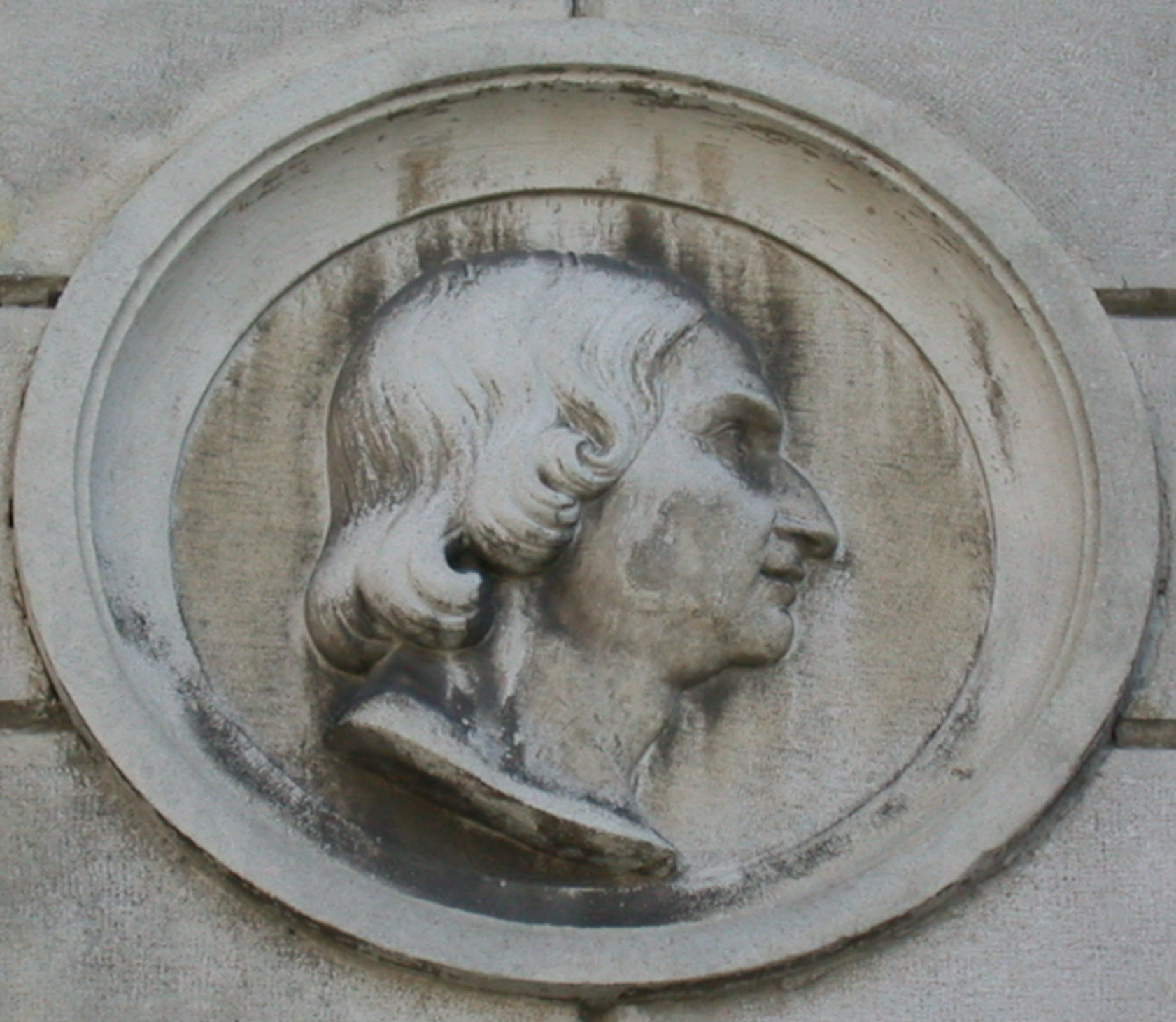 Ritratto di Benvenuto Tisi da Garofalo (pittore italiano del tardo Rinascimento) al Palazzo San Crispino a Ferrara